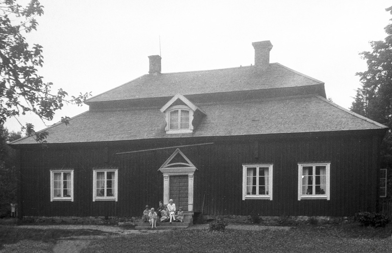 Sågarbo herrgård med familjen Brundin på trappan, från vänster Elna, Eva, Inger, Karin och Sören Brundin.